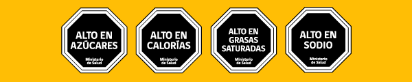 Etiquetado de alimentos en Chile.